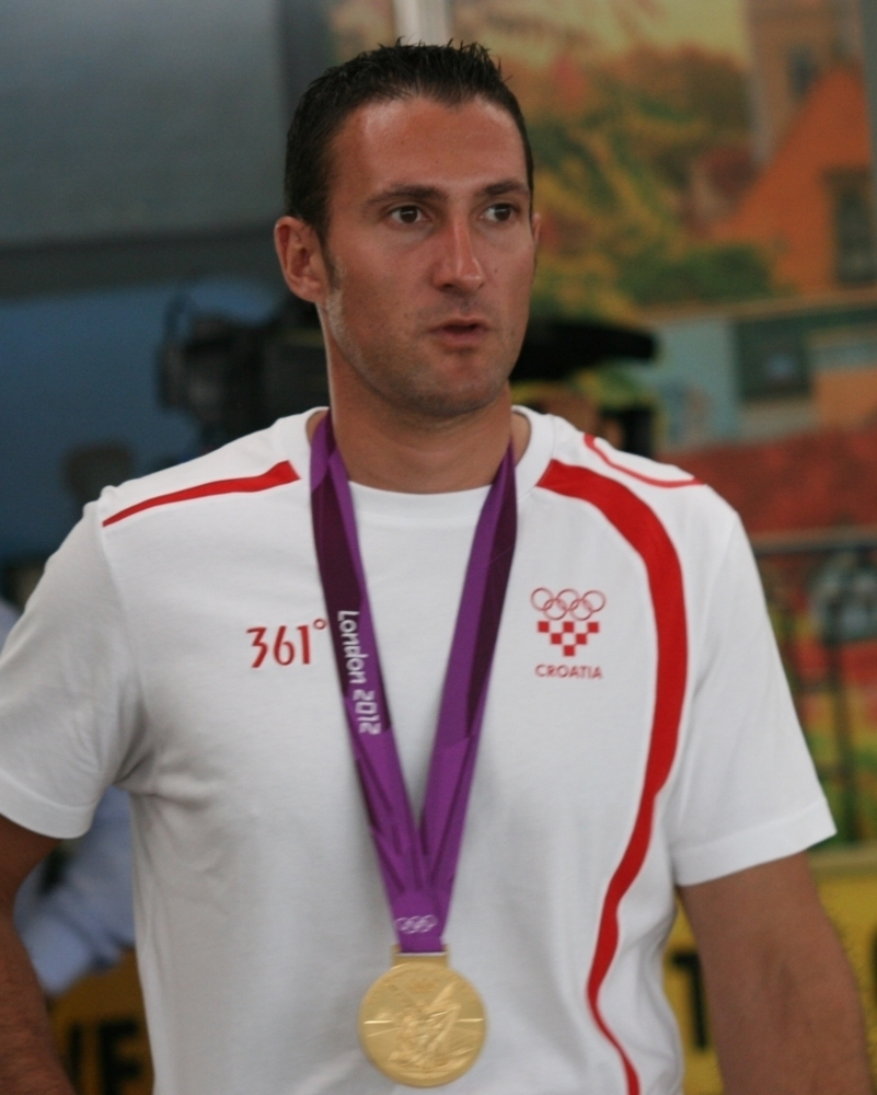 Giovanni Cernogoraz, osvajač zlata na Olimpijskim igrama u Londonu 2012. godine